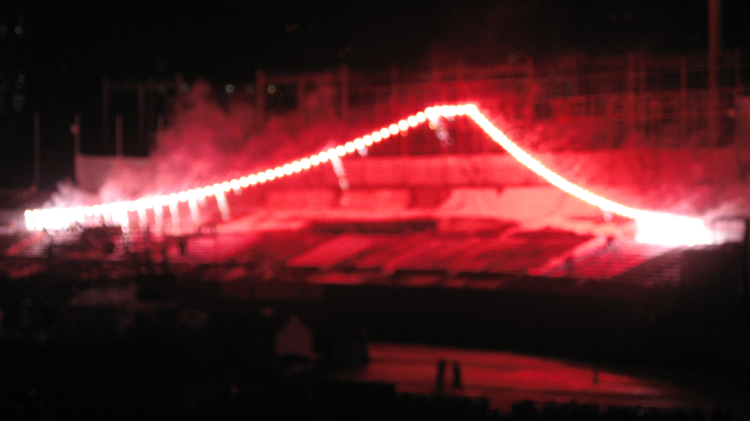 神宮外苑花火大会（2008年8月7日、明治神宮野球場）。写真は仕掛け花火。